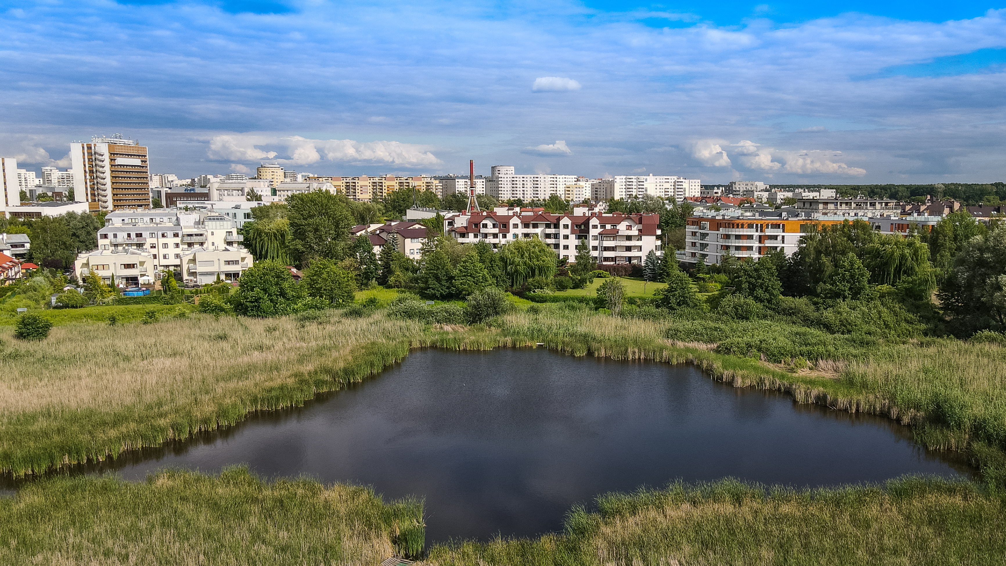 Jeziorko imielińskie - widok z drona od strony zachodniej